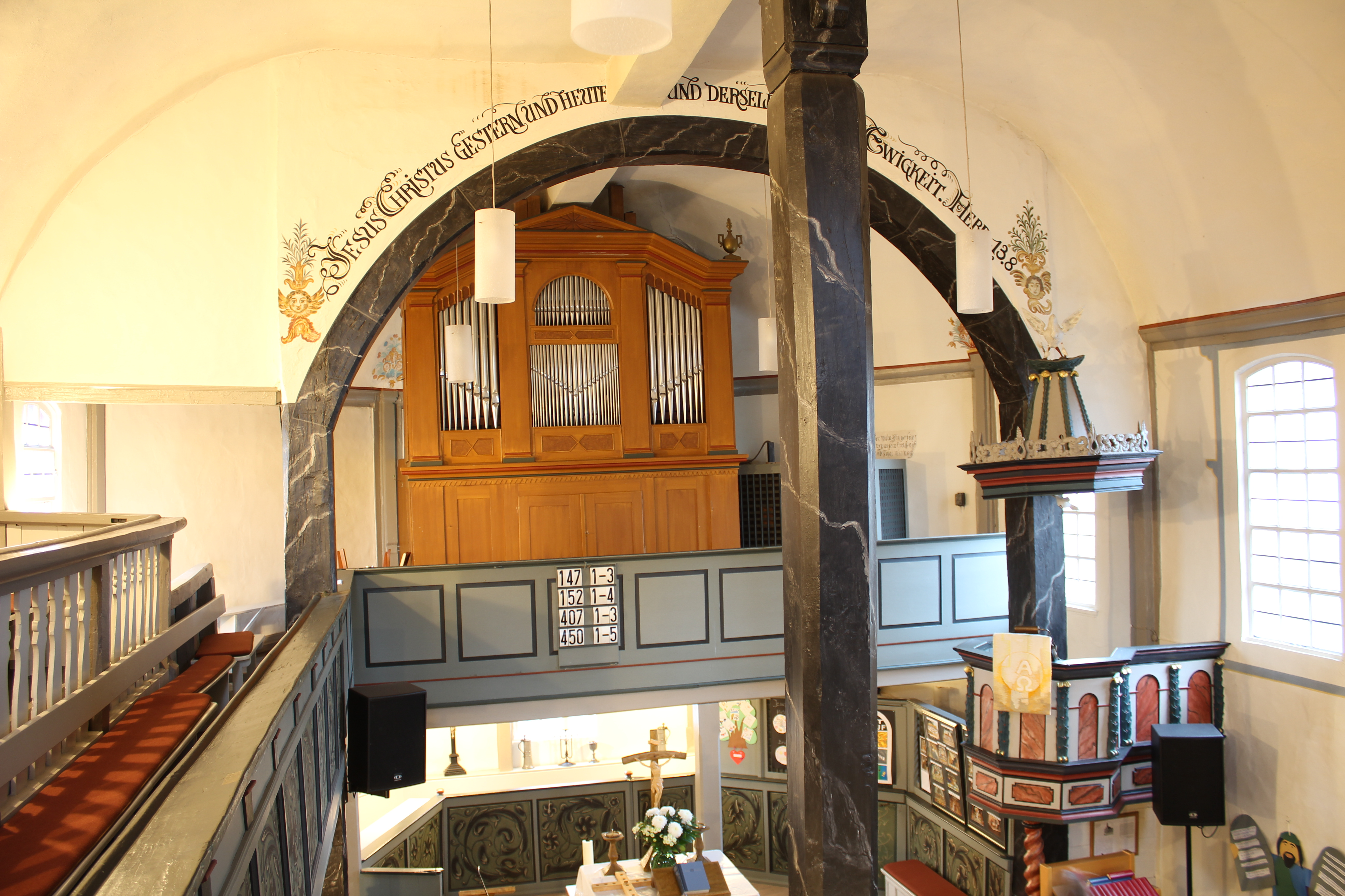 Evangelische Kirche Ruppertenrod, Mücke, Vogelsbergkreis, Hessen, Deutschland